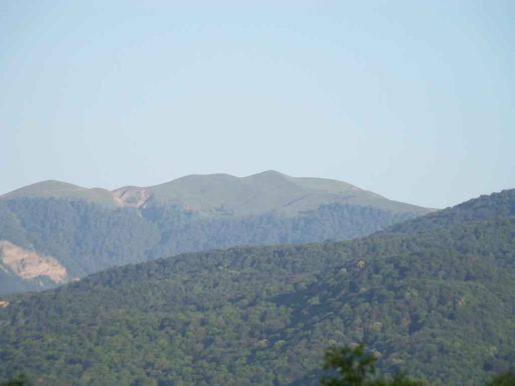 მთა ცივი